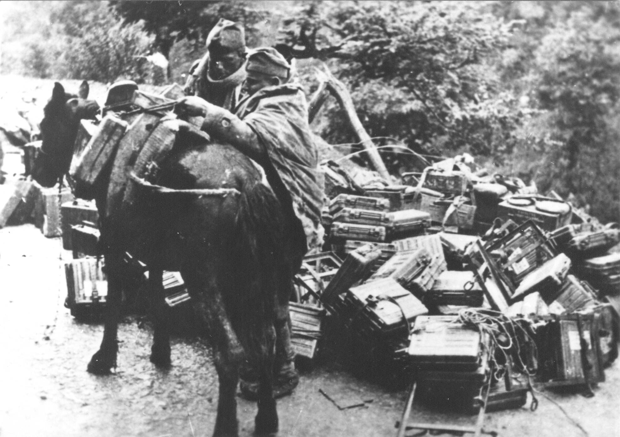 Srpskohrvatski / српскохрватски: Zaplenjena italijanska municija u dolini reke Rame za vreme četvrte neprijateljske ofanzive.